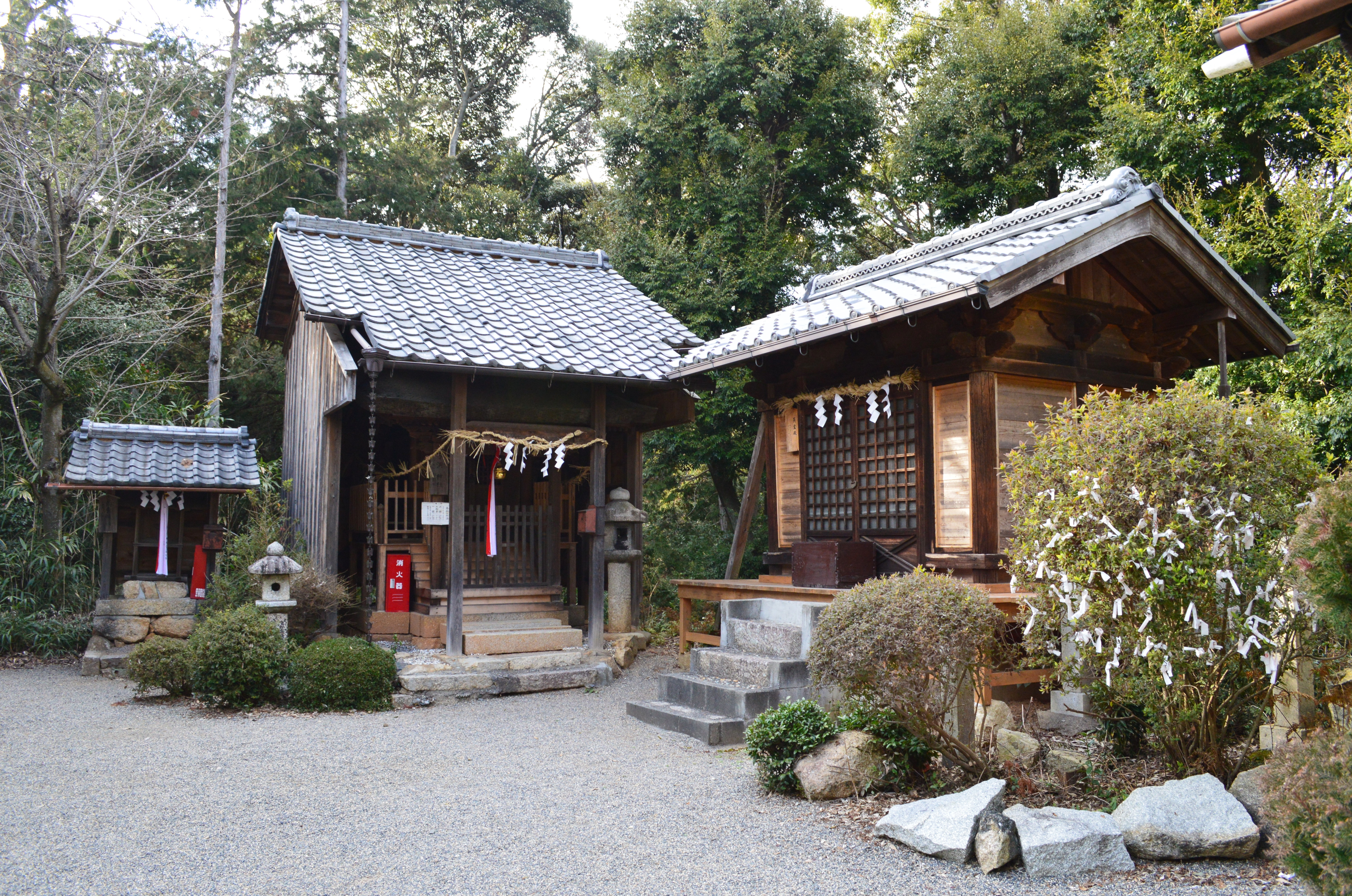 近津尾神社 境内社 Nikon D3200